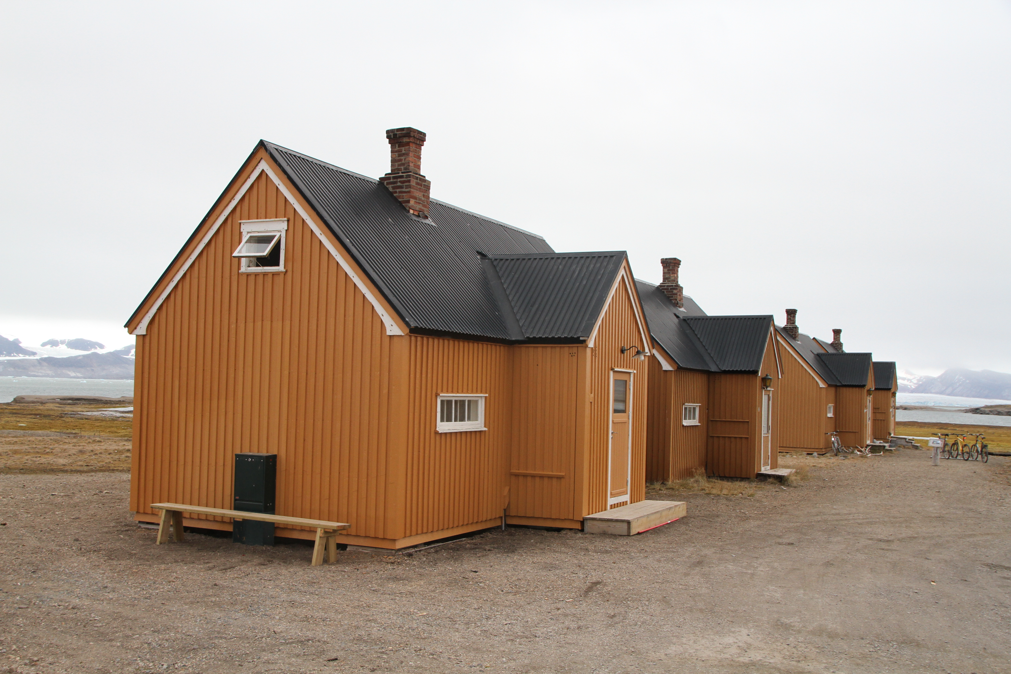 Ny-London houses, from the Blomstrandhalvöya mining community that was abandoned in the interwar period. The houses have been moved to their present location in Ny-Aalesund, where they serve as dwellings and dutch research center. Spitsbergen.